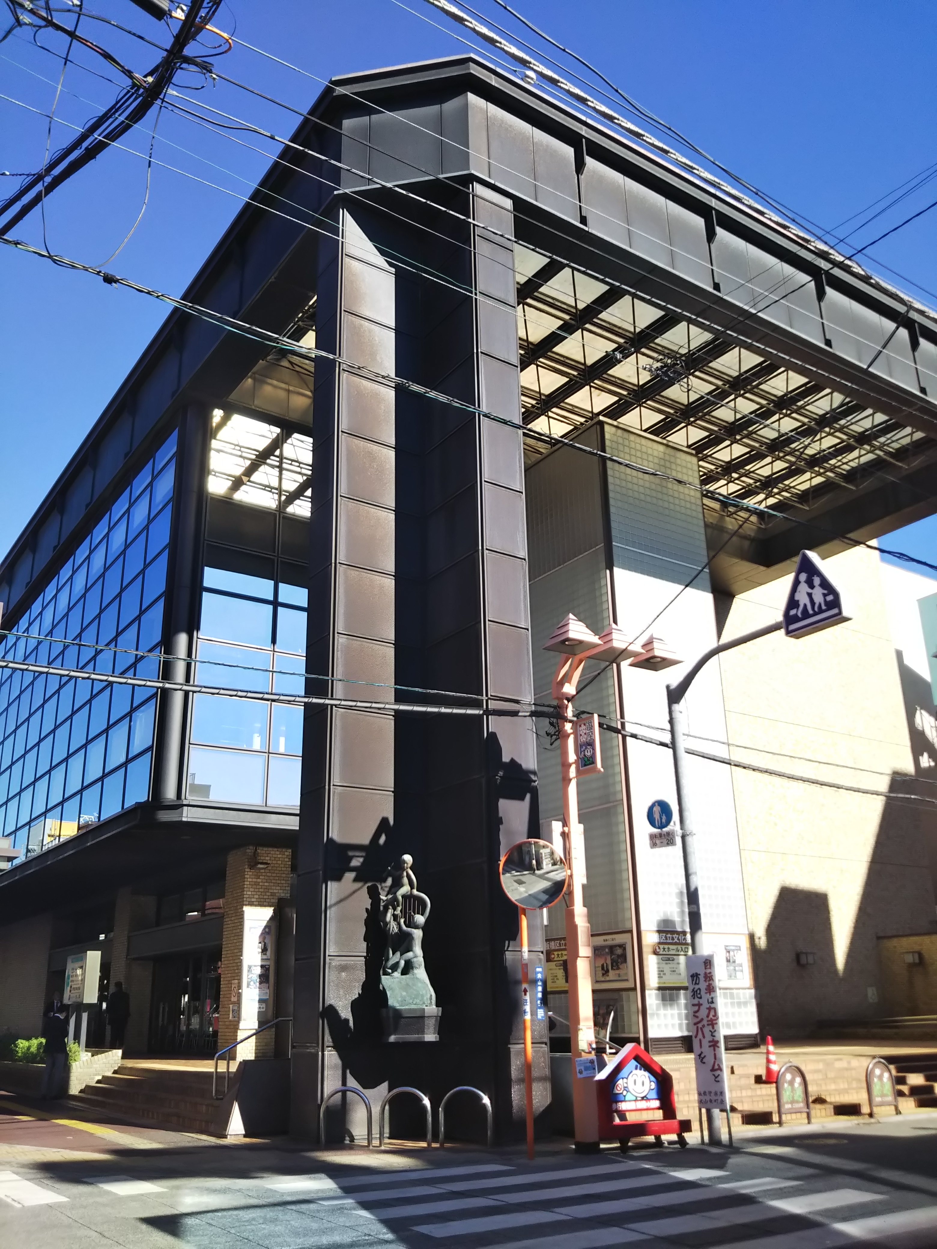 東京都板橋区大山東町、板橋区立文化会館